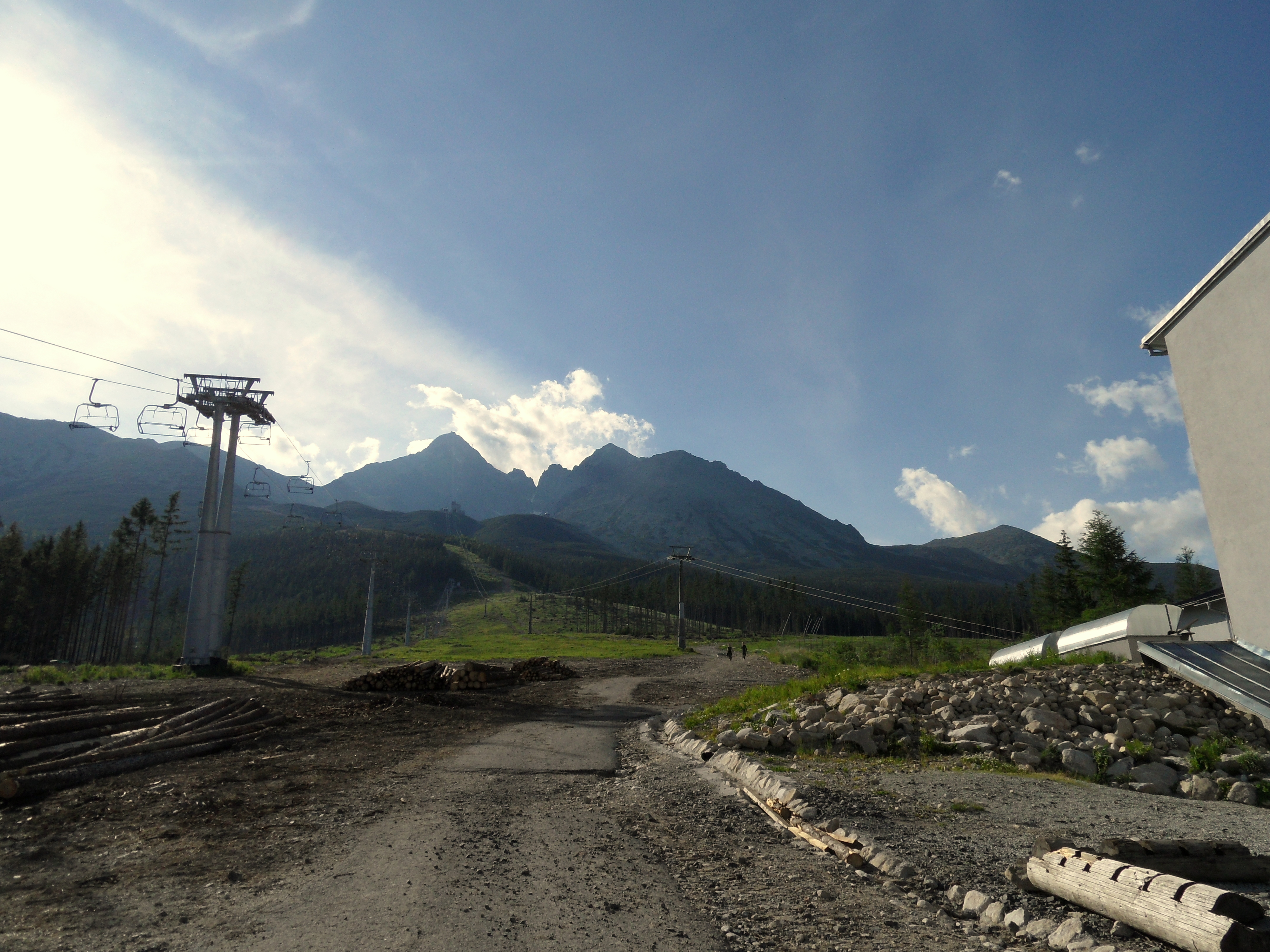 Pohľad od medzistanice Štart na Lomnický štít